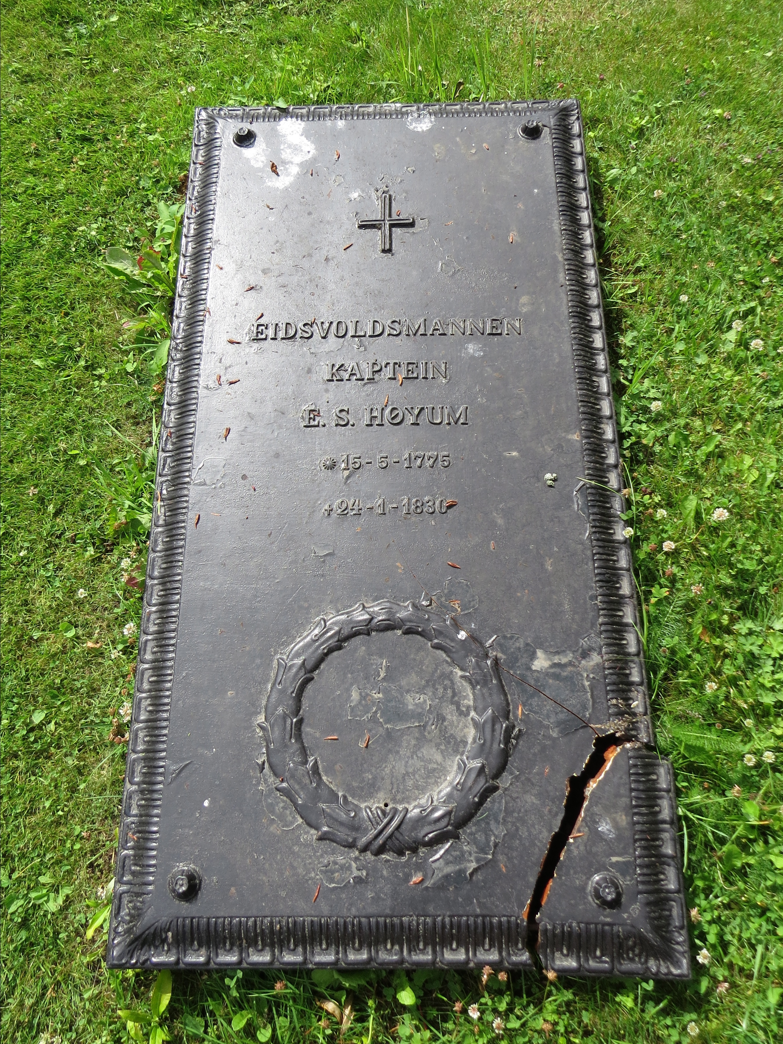 Eidsvollsmannen Kaptein E. S. Høyum * 15-5-1775 † 24-1-1830, Holla Gamle Kirke, Telemark